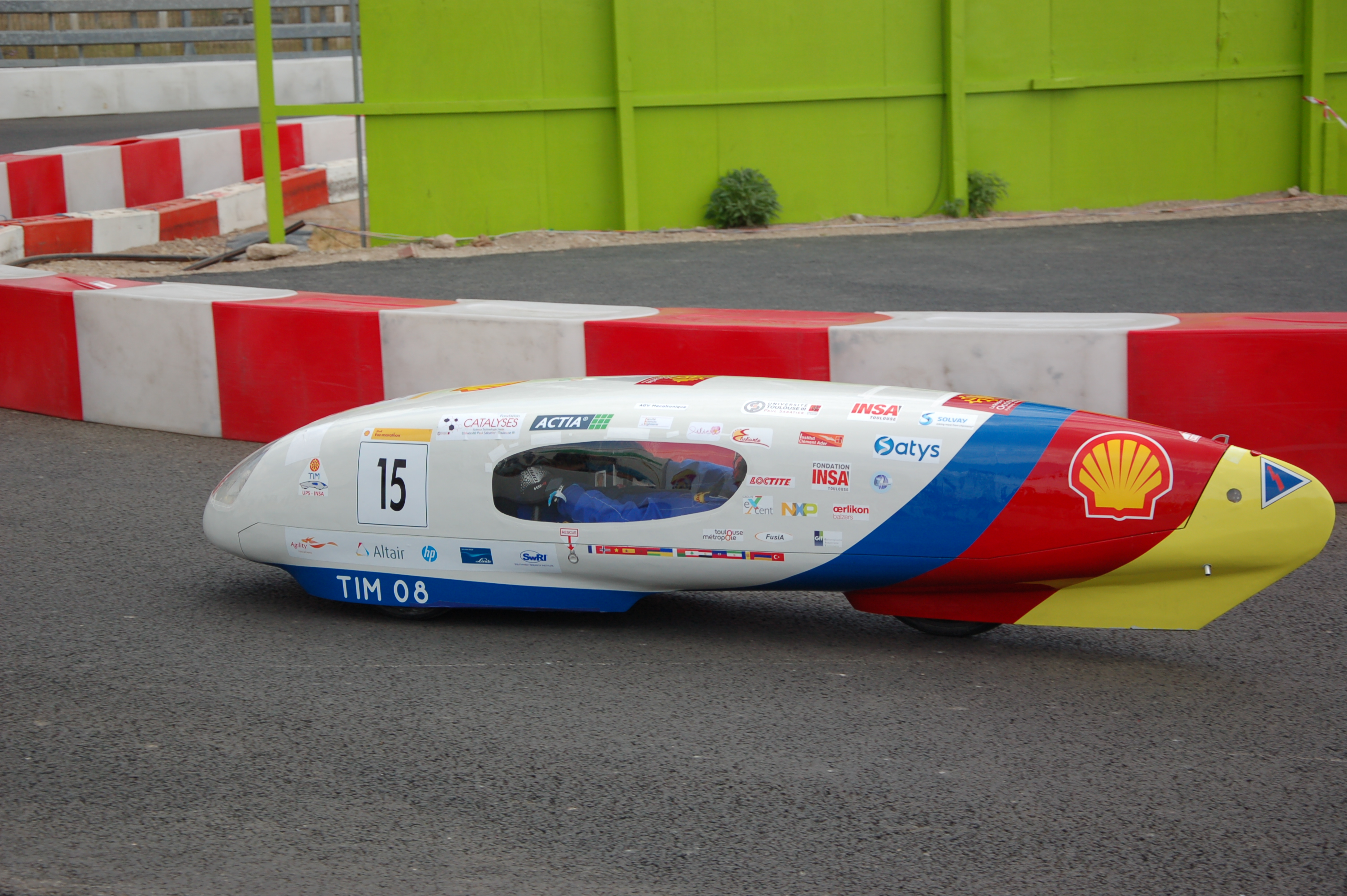 Prototype TIM08 de l'équipe TIM UPS INSA lors du Shell Eco Marathon 2018